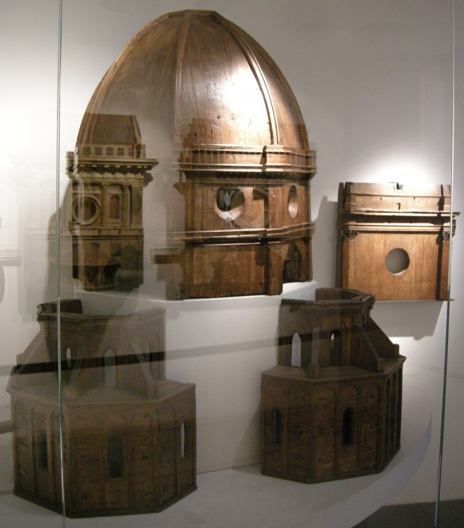 Filippo brunelleschi (attr.) modello ligneo per la cupola e le tribune